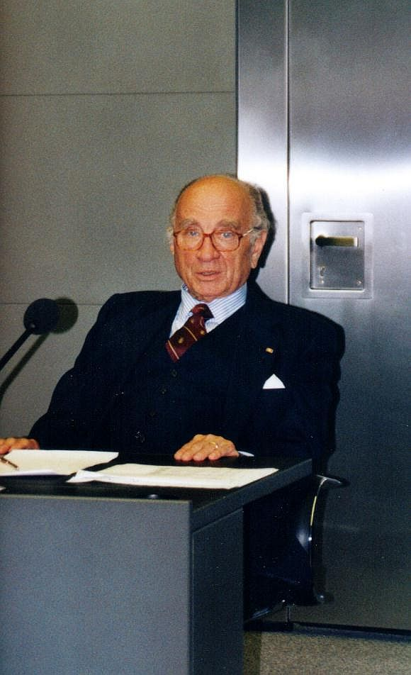 Otto Graf Lambsdorff Anfang September 2001 im Presse- und Informationsamt der Bundesregierung (Bundespresseamt) in der Dorotheenstraße, Berlin-Mitte. Die konkludente Zustimmung des Abgebildeten liegt vor.